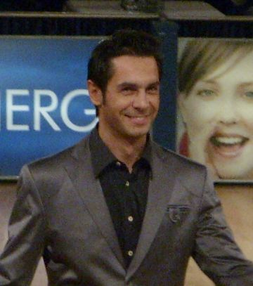 Roberto Albanese (Trainer des A-Teams des GGC Bremen, Deutsche Meisterschaft der Formationen Standard und Latein, 2009)